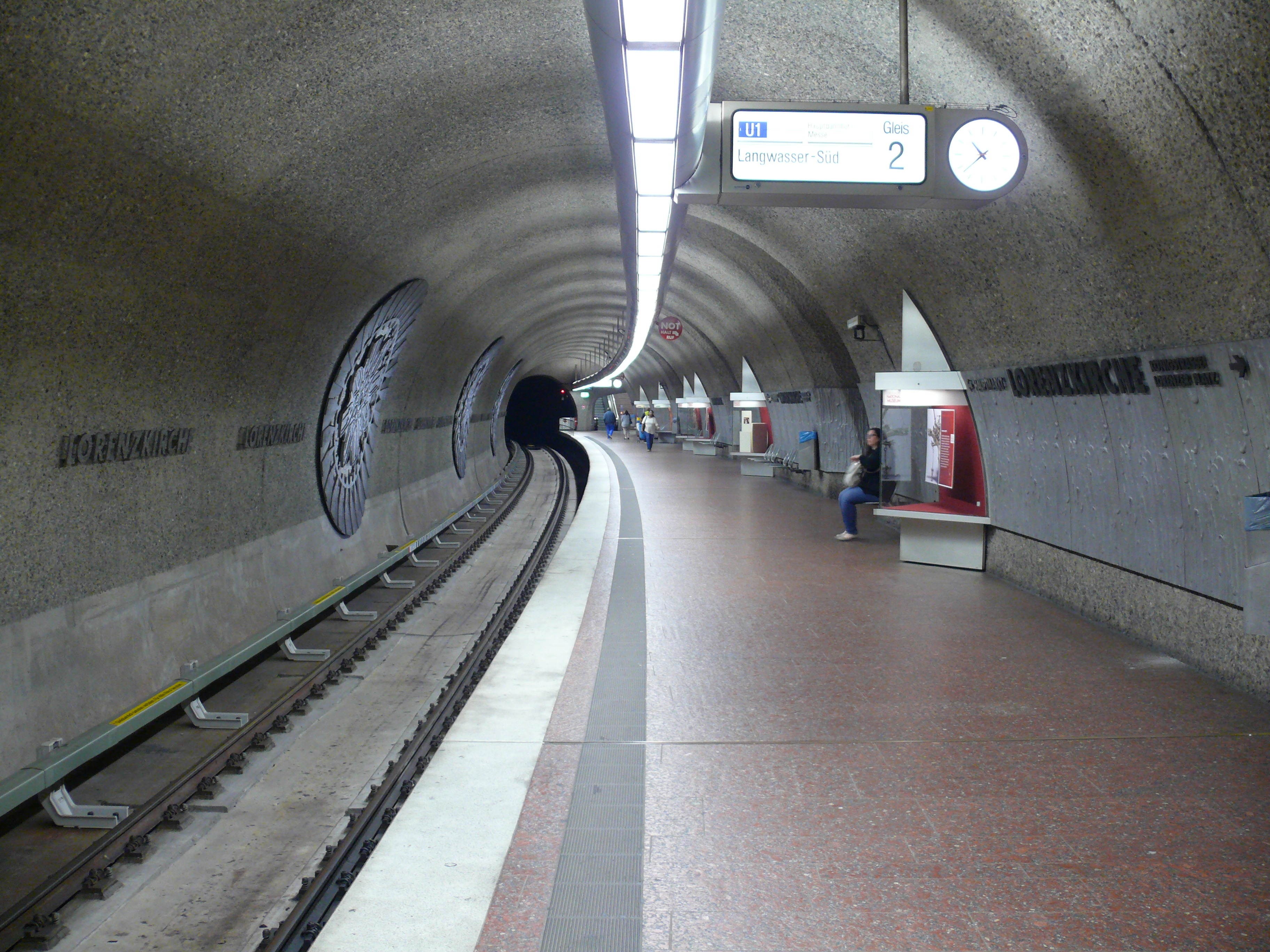 Gleis 2 am U-Bahnhof Lorenzkirche in Nürnberg.